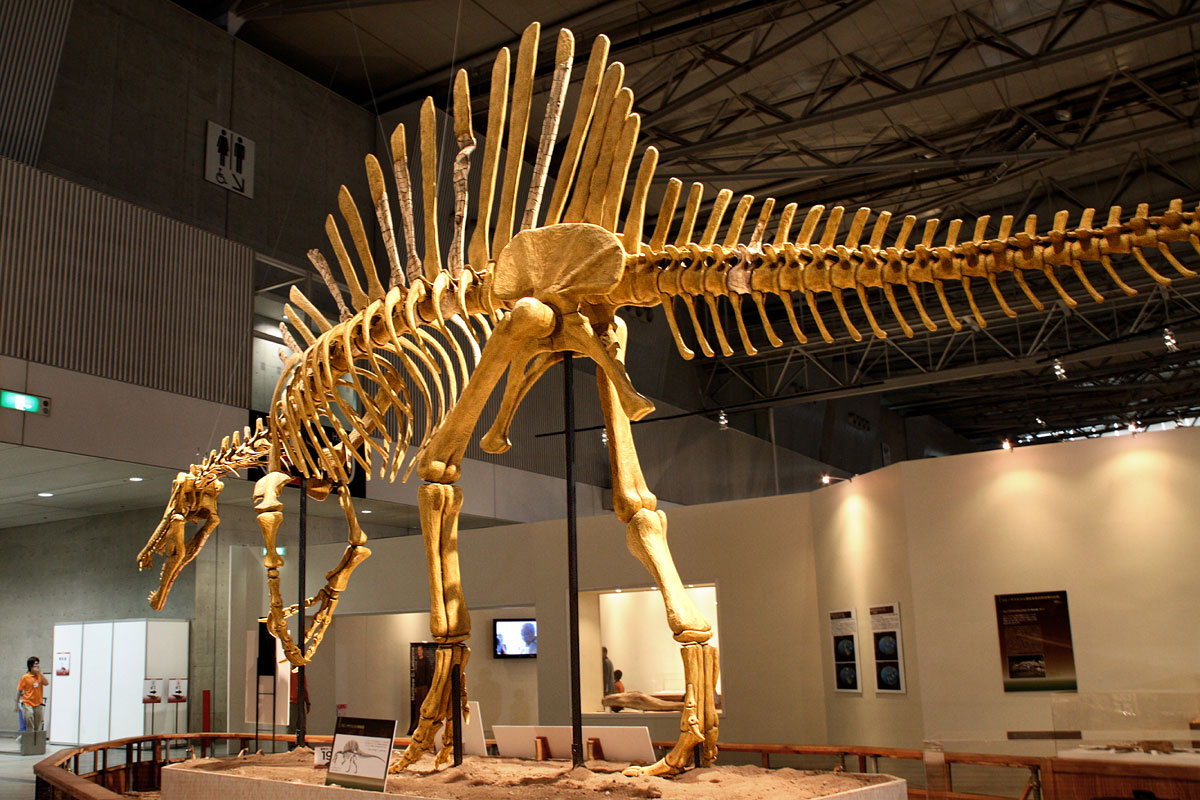 Spinosaurus - 03